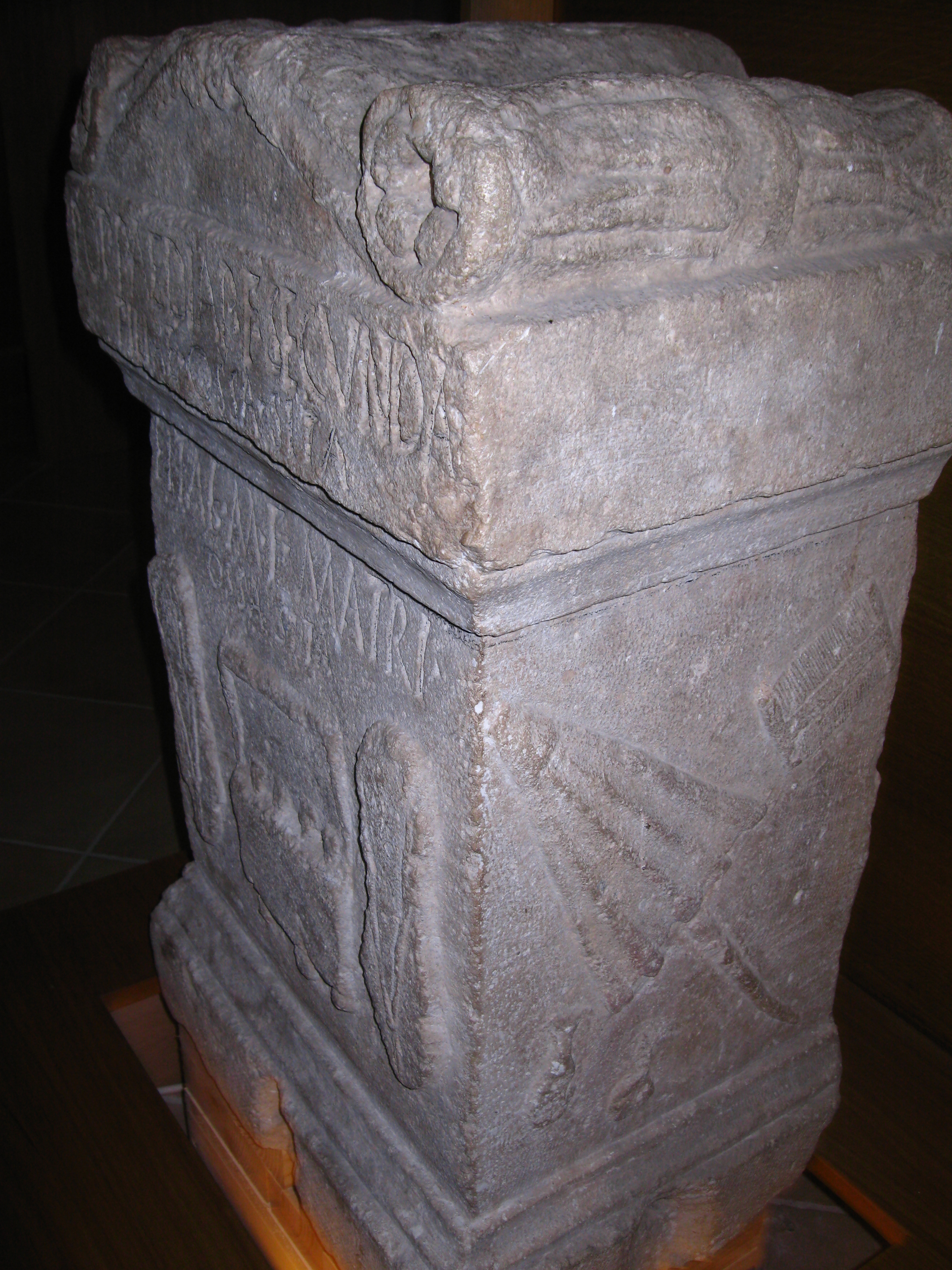 Pietra tombale originale di Poppedia Secunda, forse appartenente alla stessa famiglia di Quinto Poppedio Silone, capo degli insorti italici al tempo della guerra sociale (91-89 a.C.) contro Roma